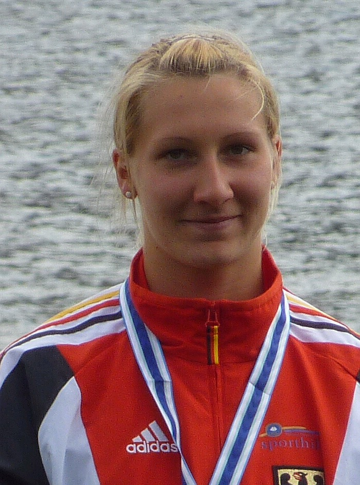 Weltmeisterin im Zweier-Kajak 2011 über 1.000m